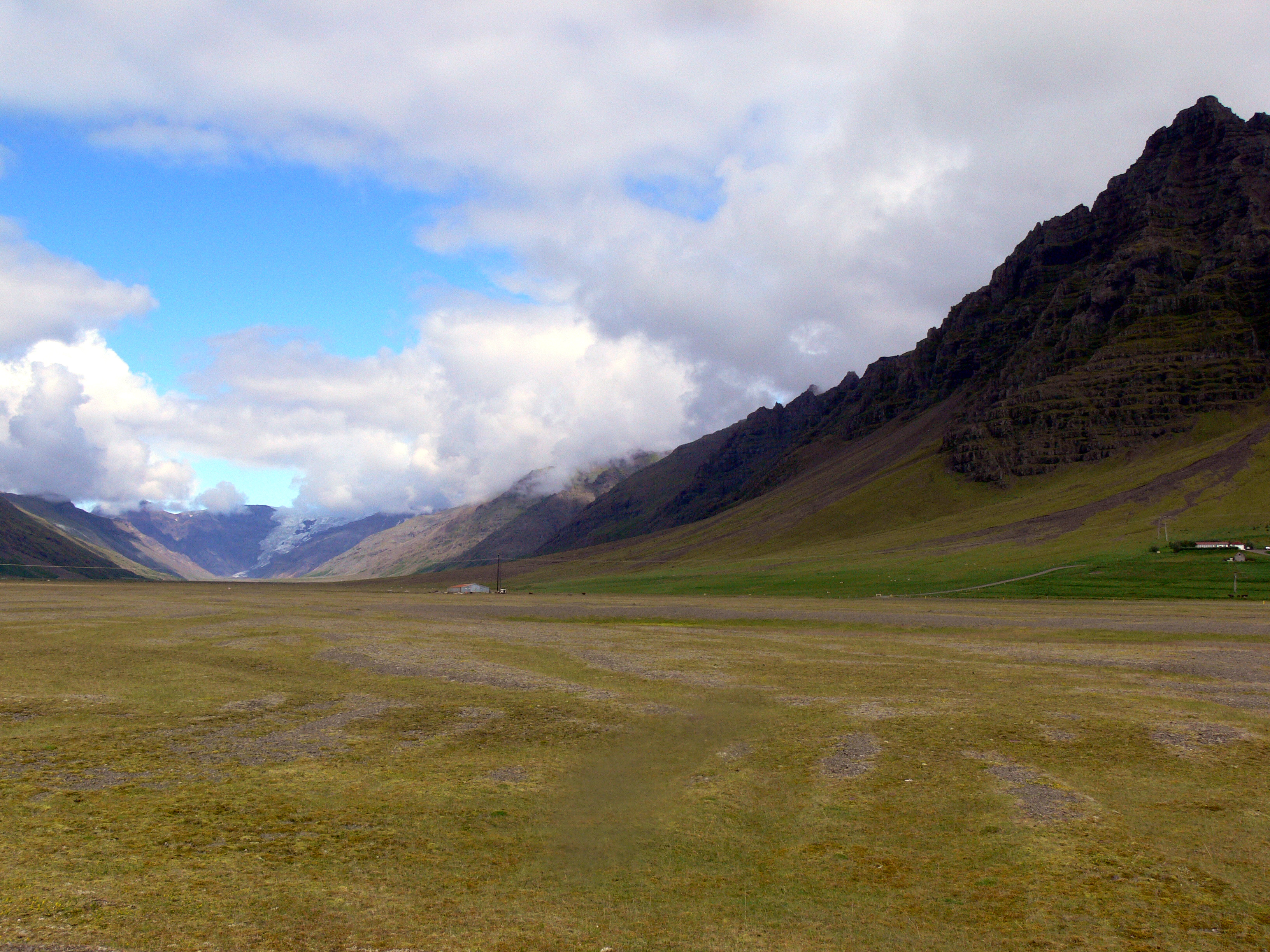 Kálfafellsdalur mit Kálfafellstindur und dem Hof Kálfafell vorn rechts..